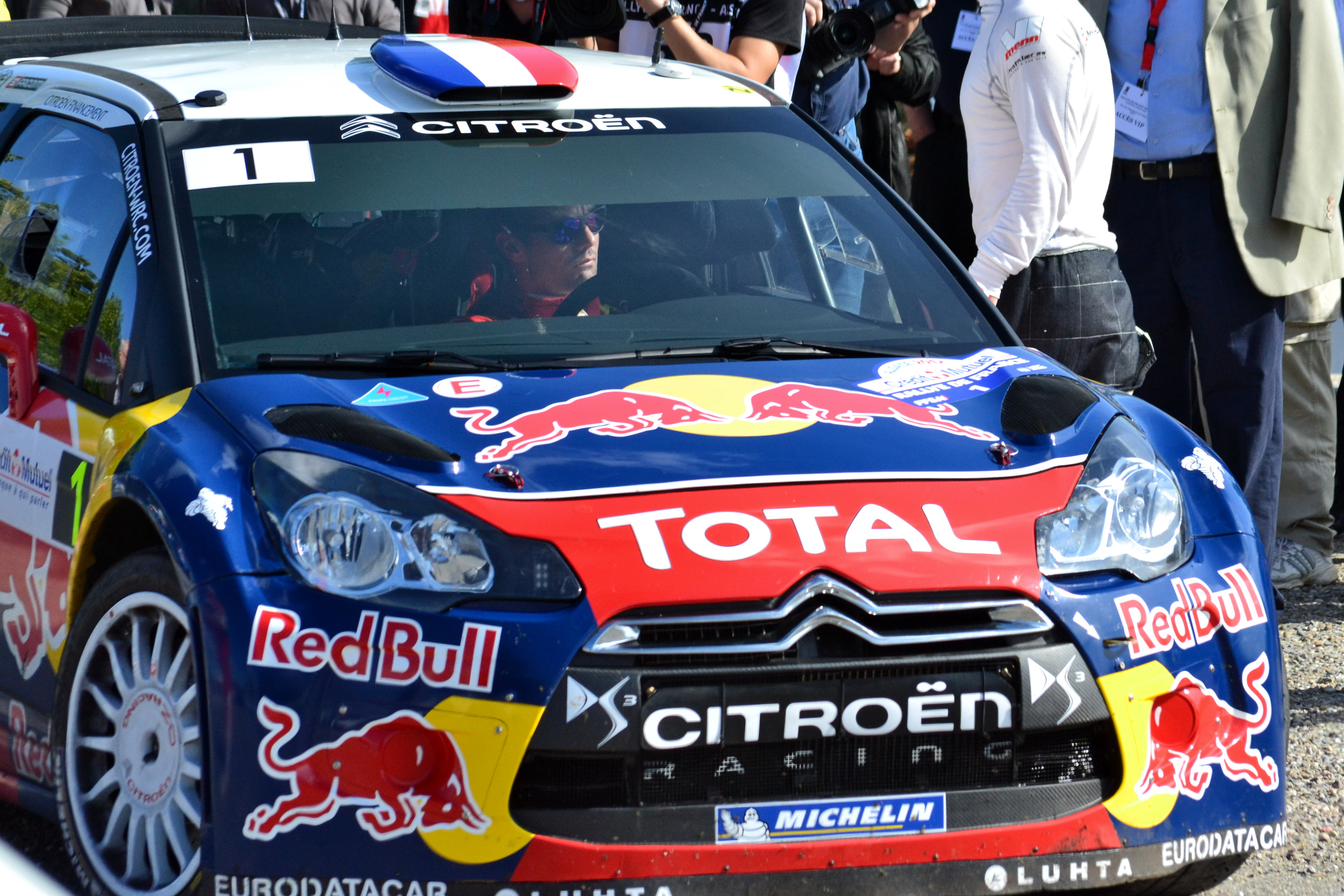 Sébastien Loeb au parc d'assistance de Colmar durant le Rallye de France-Alsace 2012.